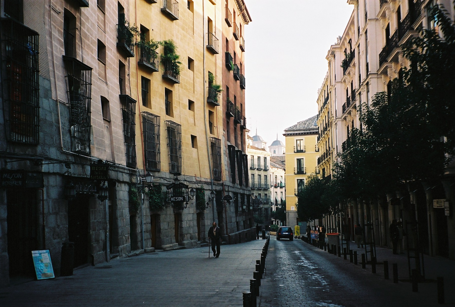 Madrid, España. Calle de la Cava de San Miguel hacia el Arco de Cuchilleros.